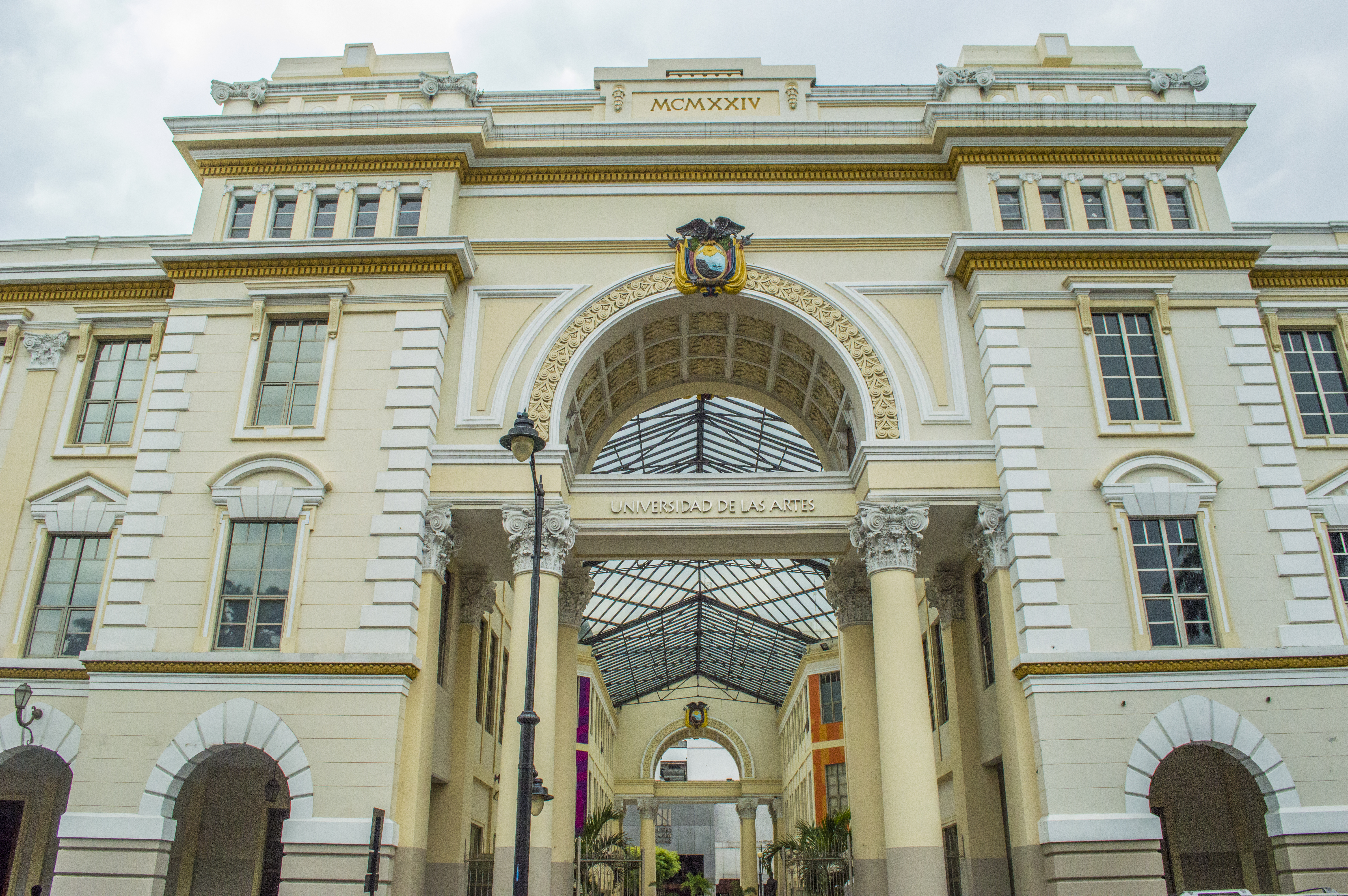 Edificio de la Universidad de las Artes en 2015, antigua Gobernación del Guayas, ubicado en Guayaquil, Ecuador.